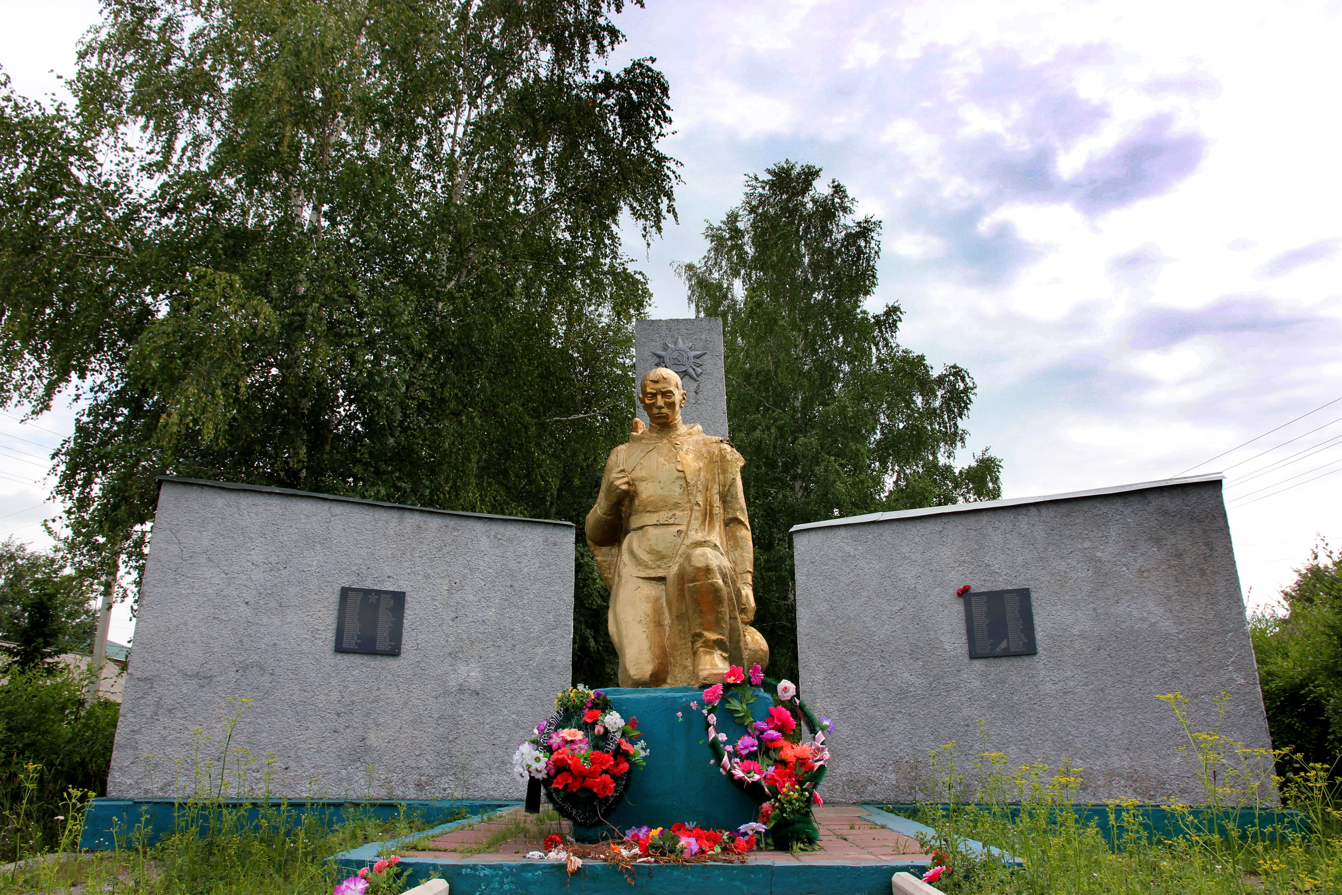 Мемориал воинам-односельчанам, павшим в 1941-45 гг.: Восходящий, Ленинск-Кузнецкий район, Кемеровская область